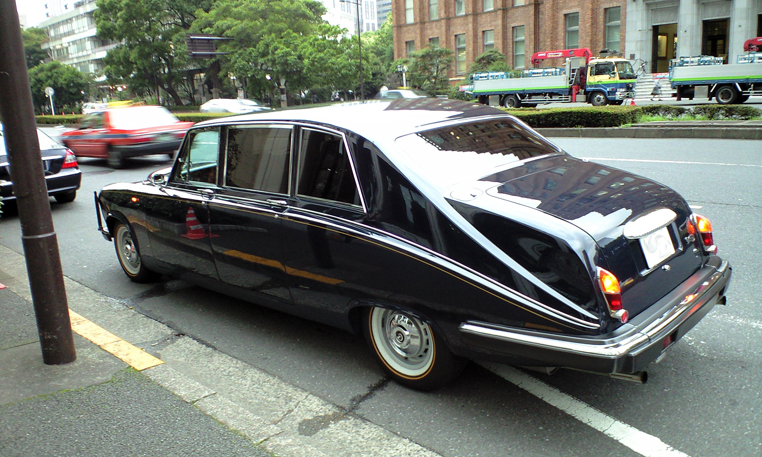 Daimler DS420 Limousine ＠ Hibiya, Tokyo (東京, 日比谷)